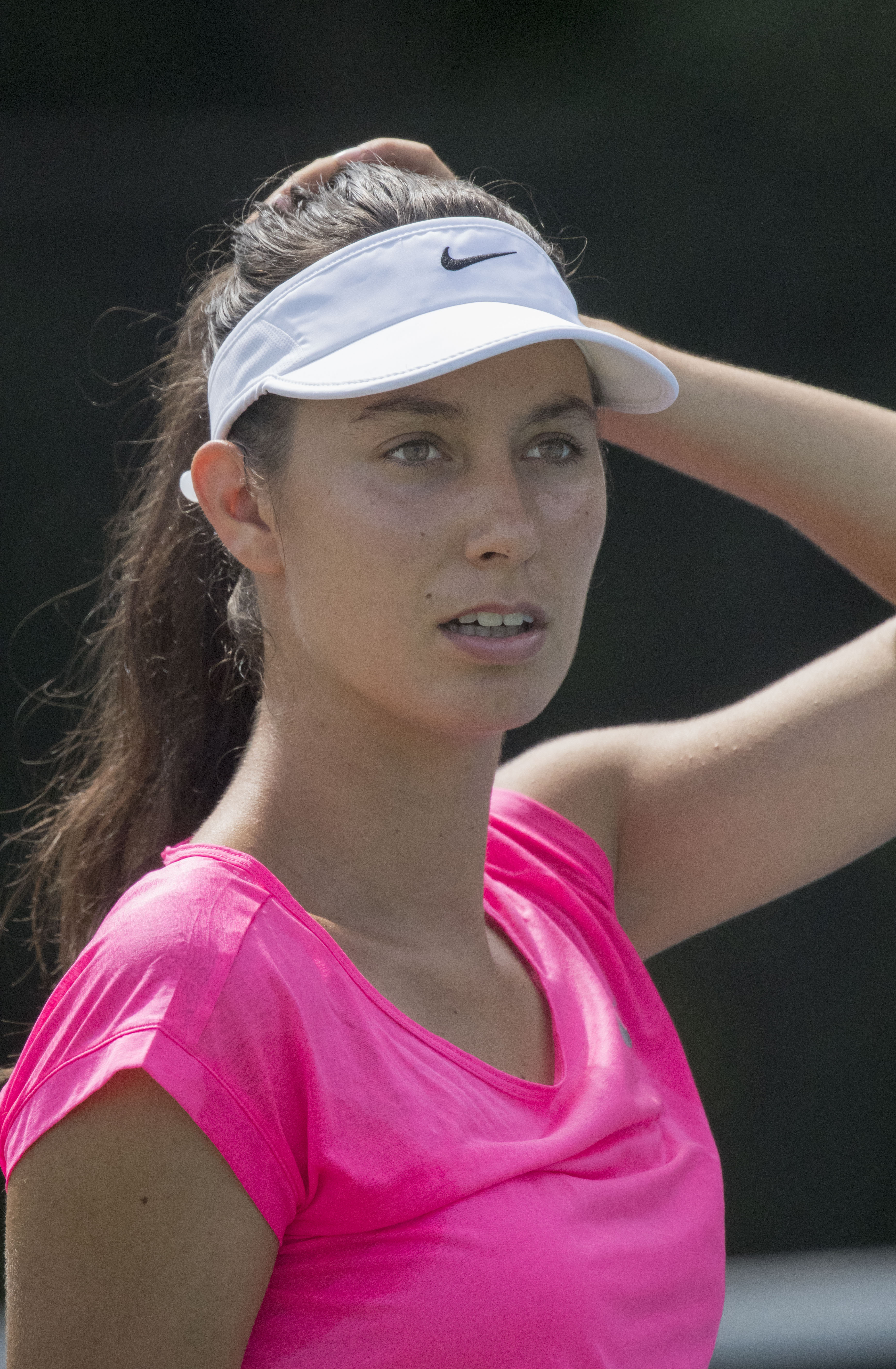 2016 Citi Open